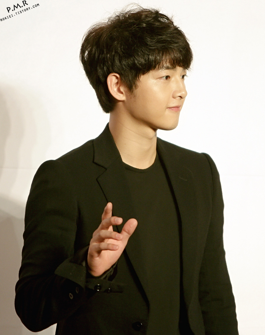 2012년 9월 5일 착한남자 제작 발표회에서.